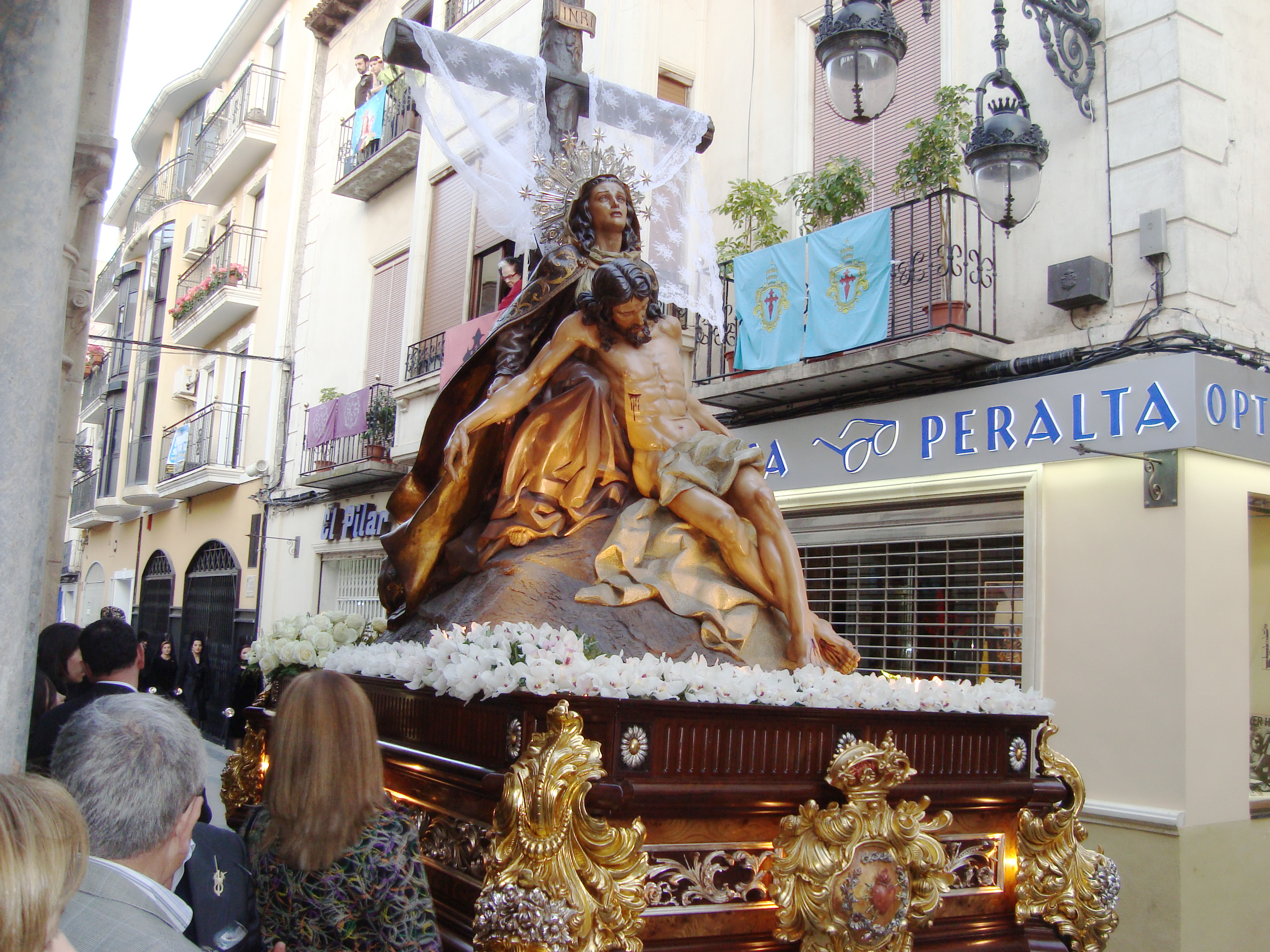 Nuestra Señora de los Dolores, obra de 1943, del escultor Federico Coullaut-Valera. Desfila Domingo de Ramos y Viernes Santo en la Semana Santa de Orihuela